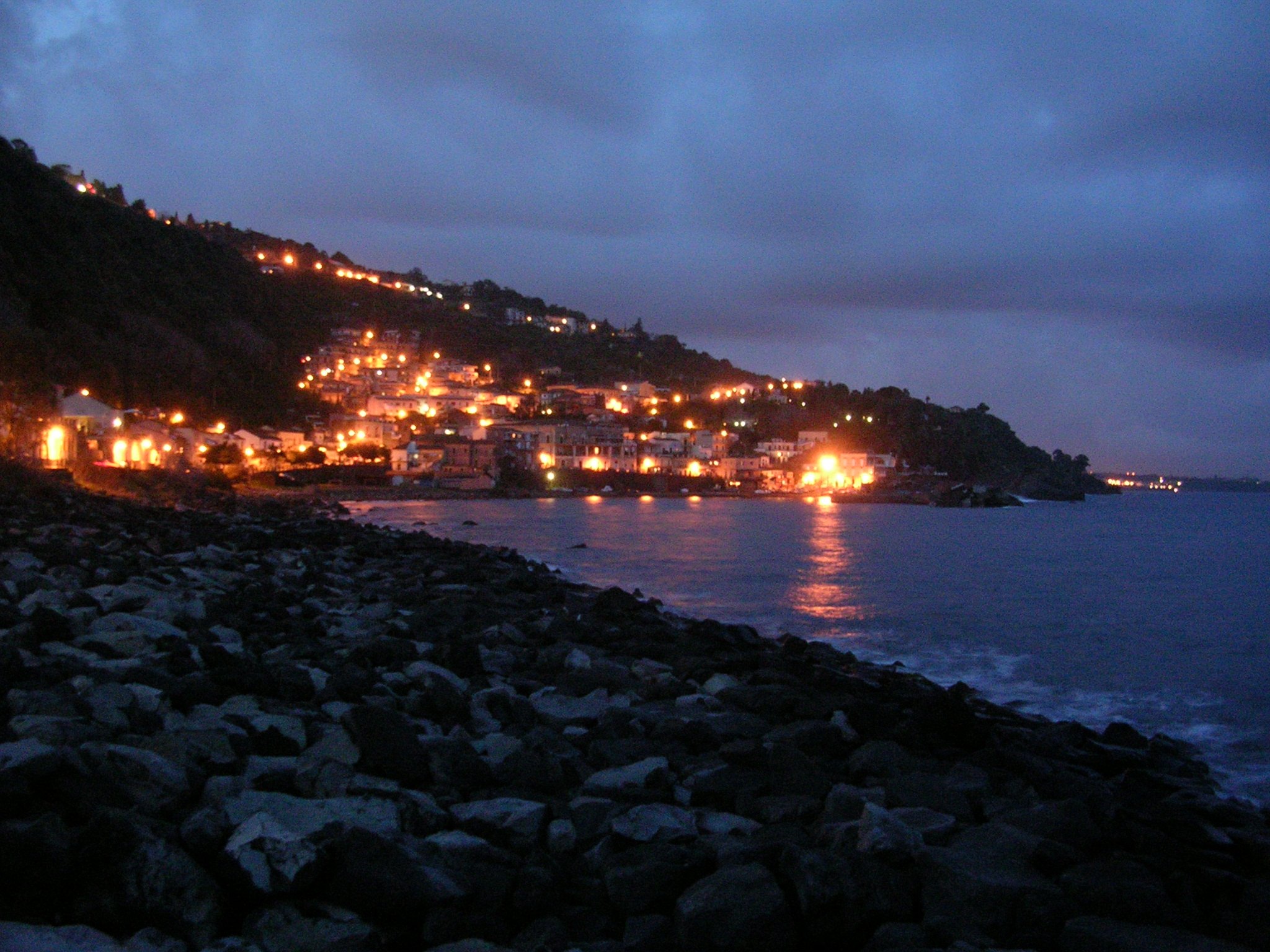 Santa Maria la Scala seen from Testa dell'Acqua - Acireale - Italy